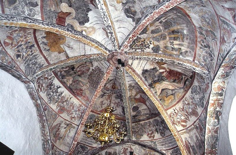 Sønderholm Kirke i Danmark. Korhvælv